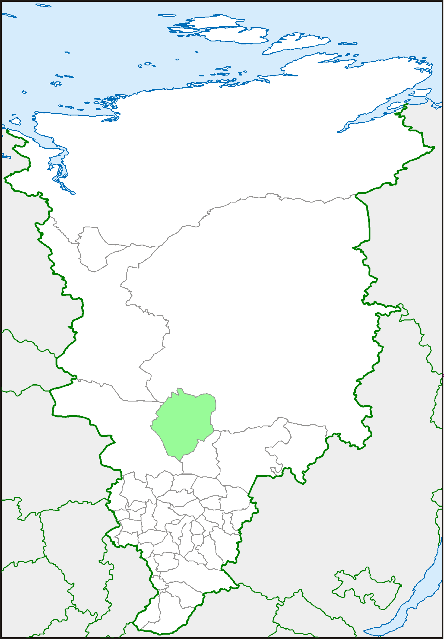 Северо-Енисейский район на карте Красноярского края